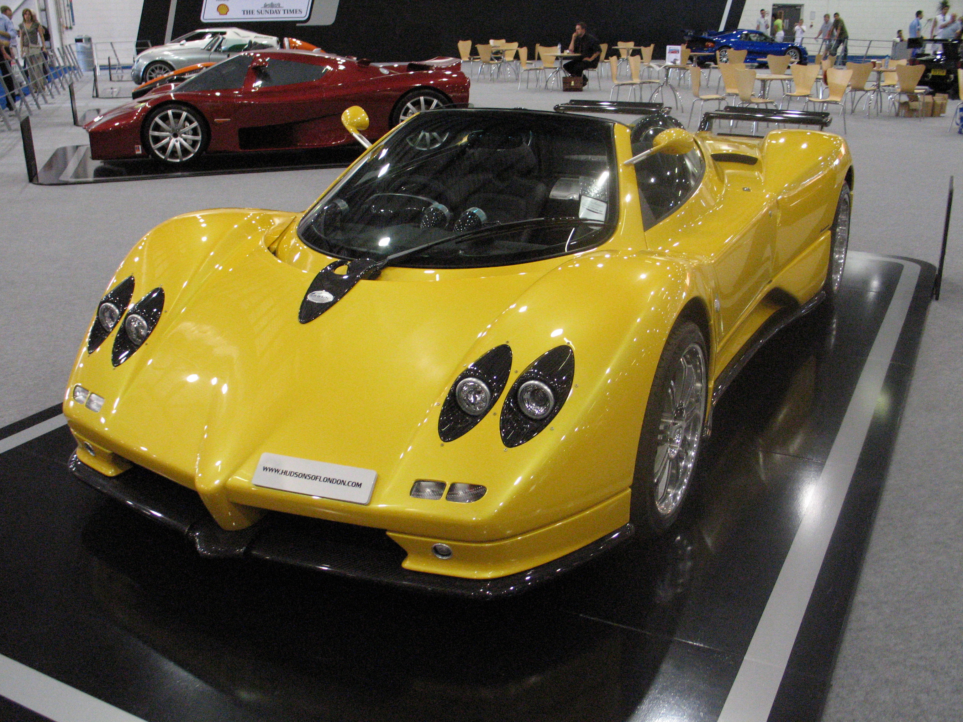 Pagani Zonda Roadster